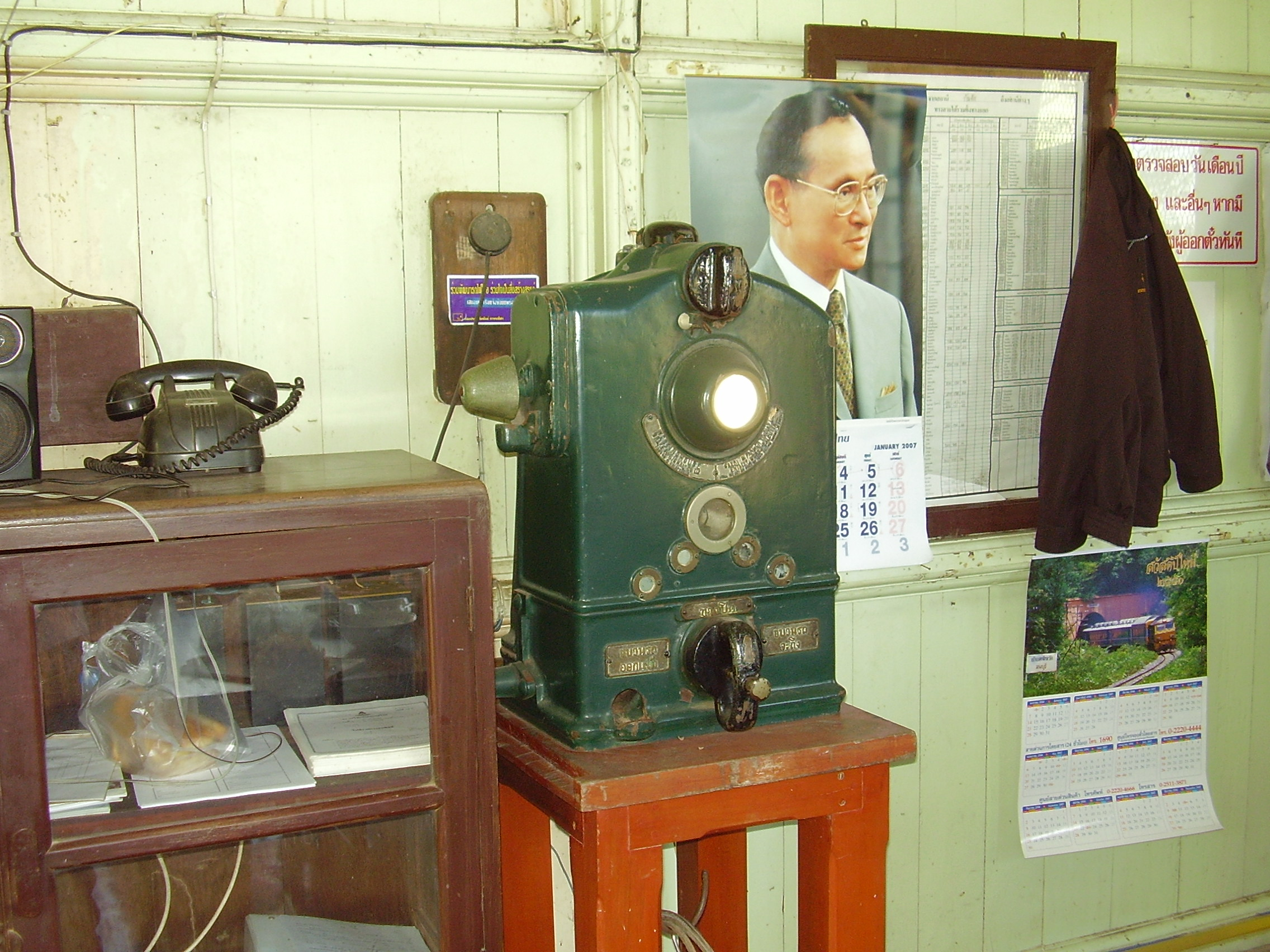 Kantang railway station